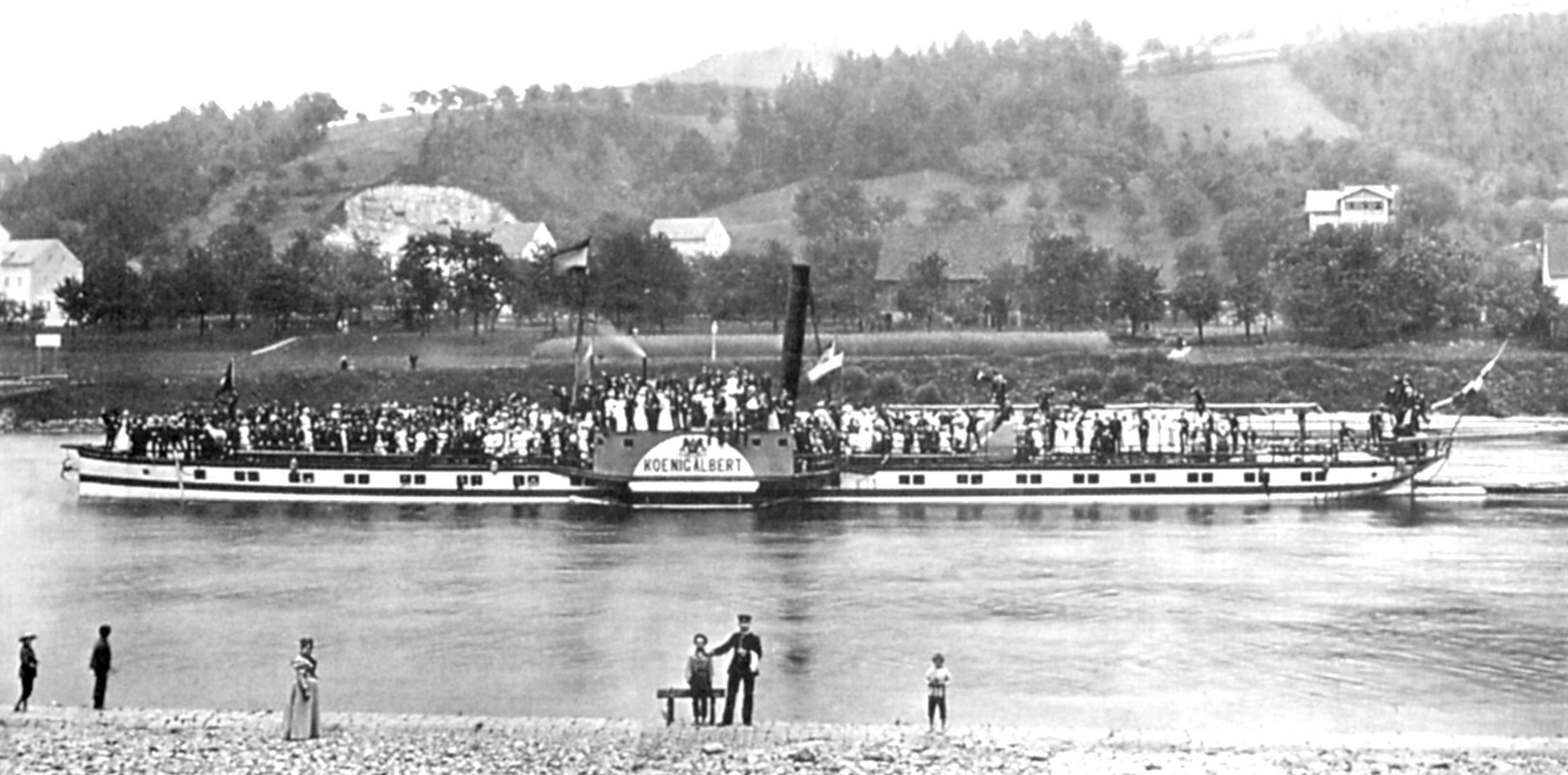 Dampfschiff Koenig Albert